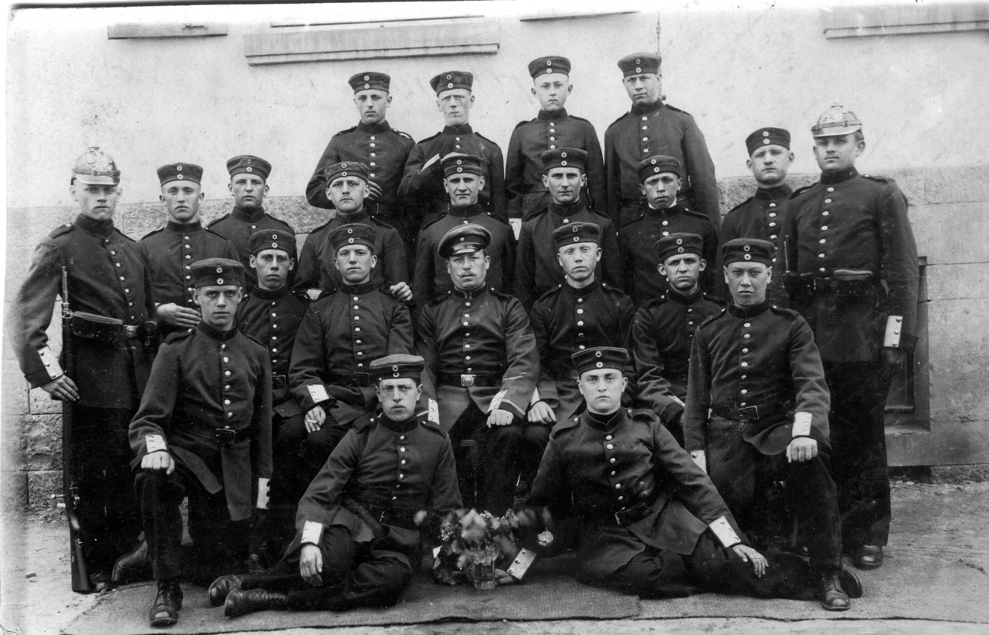 Eine Korporalschaft des II.Ersatz-Bataillon des Infanterie Regiment 171 bei seiner Ausbildung in Lahr / Schwarzwald, damals Lahr (Baden). Der kleine Trupp junger Männer wird von einem Korporal (Feldwebel) für den Kriegsdienst an der Ypern-Front ausgebildet. Geschichtlicher Hintergrund: Das I. Ersatz-Bataillon Infanterie-Regiment Nr. 171 bei Kriegsausbruch 1914 gemäß dem Schlieffenplan hinter dem Rhein in Lahr aufgestellt. Dabei wurden auch zwei Komp. zum Brig.-Ers.-Btl. Nr.82 übernommen und auch der Ersatz für das Infanterie-Regiment Nr. 417. Folglich wurde das II. Ersatz-Bataillon Infanterie-Regiment Nr. 171 in Lahr aufgestellt und bildete während des Krieges den Ersatz für das IR 171 ausgebildet. Daher wurde auch II. Ersatz-Bataillon Infanterie-Regiment Nr. 171 aufgestellt, welches am 30.11.1917 aufgelöst wurde.